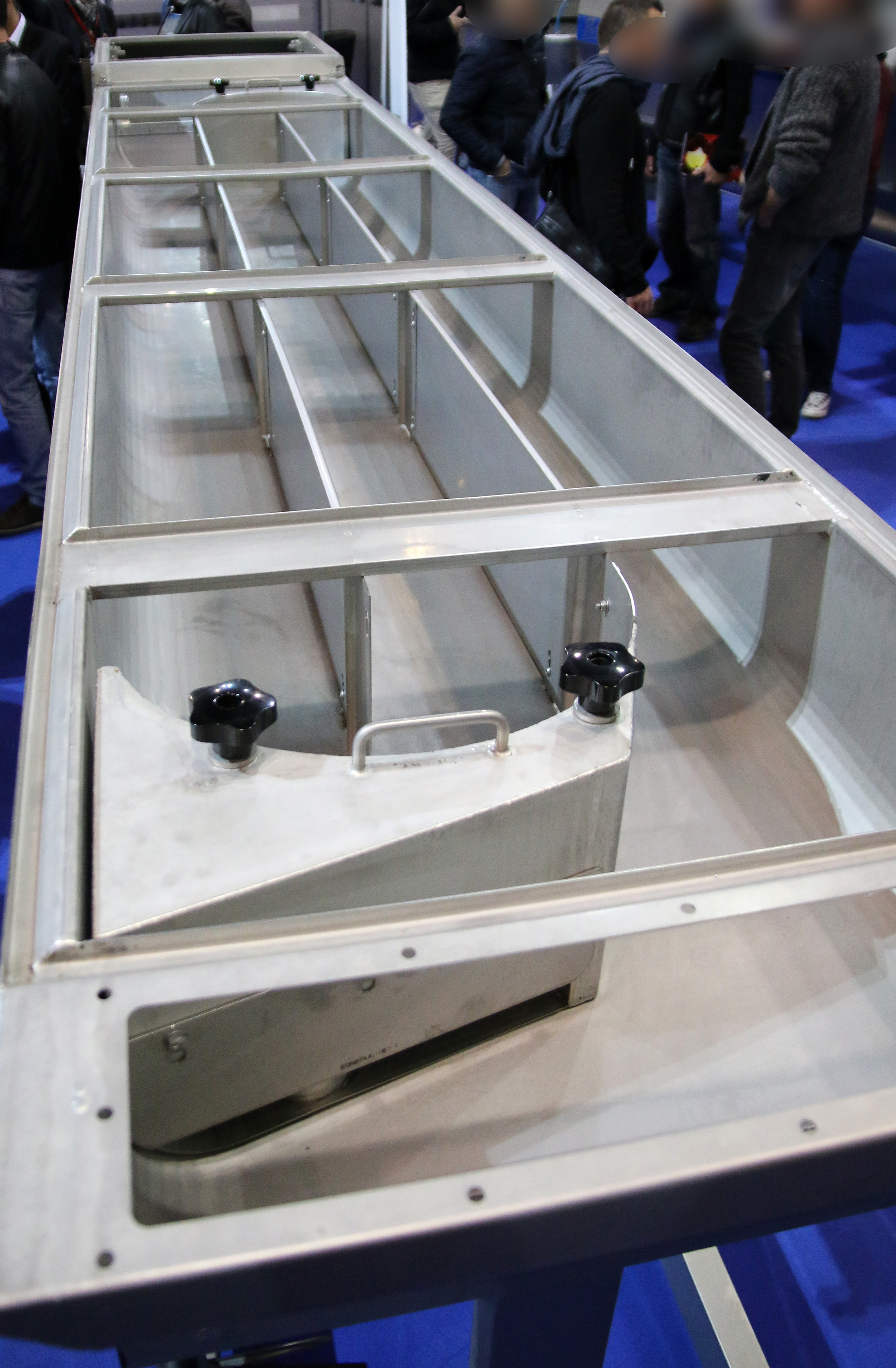 Système d'échangeur thermique permettant de chauffer la vendange entière